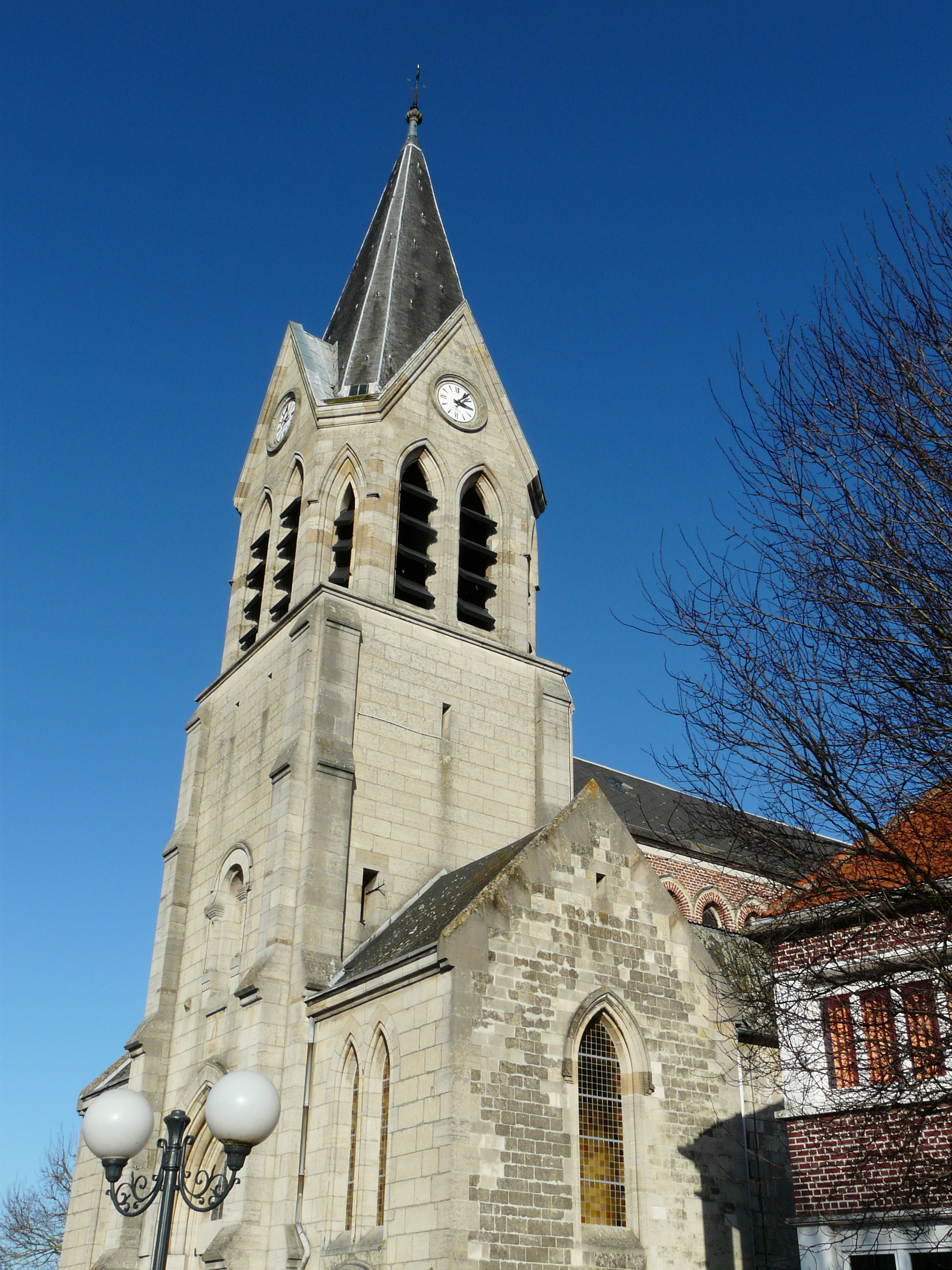 L'église d'Avesnes-les-Aubert